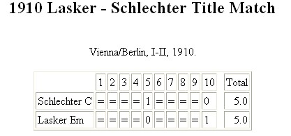 Chess_Lasker-Schlechter_Title_Match 1910